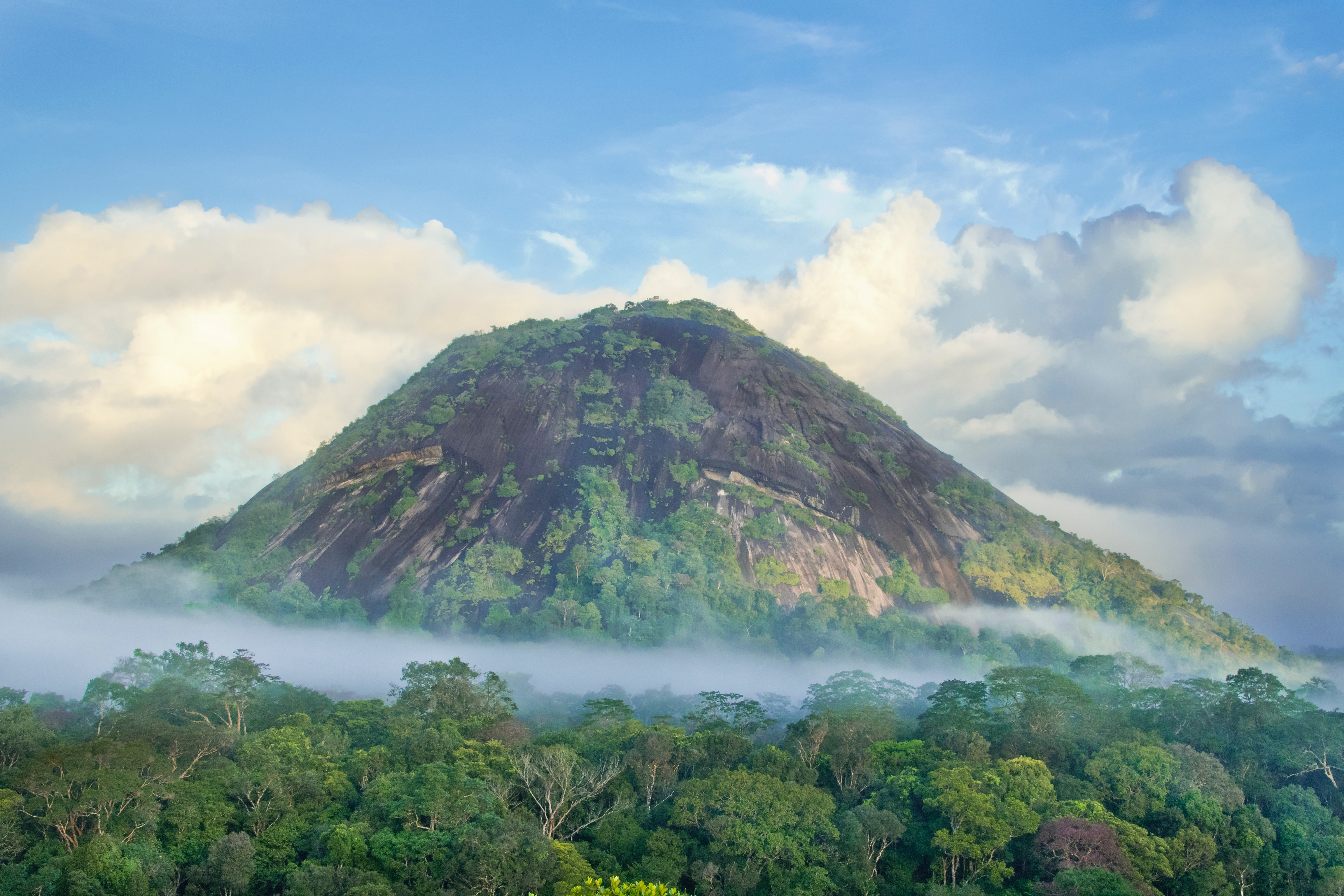 Monte Karupina, Terra Indígena Uaçá, Oiapoque/AP